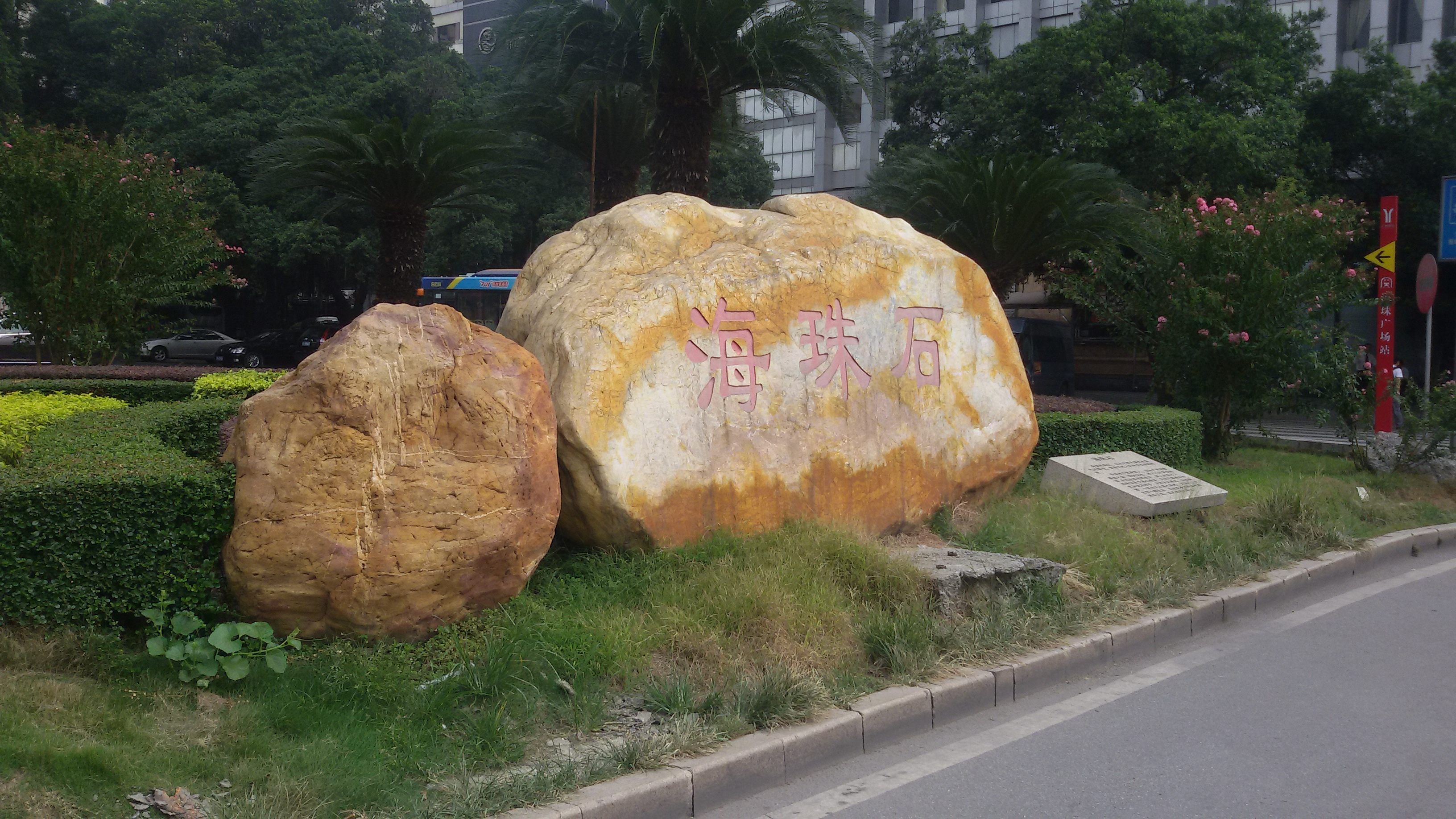 粵語: 海珠石（海珠广场东南边嗰嚿）